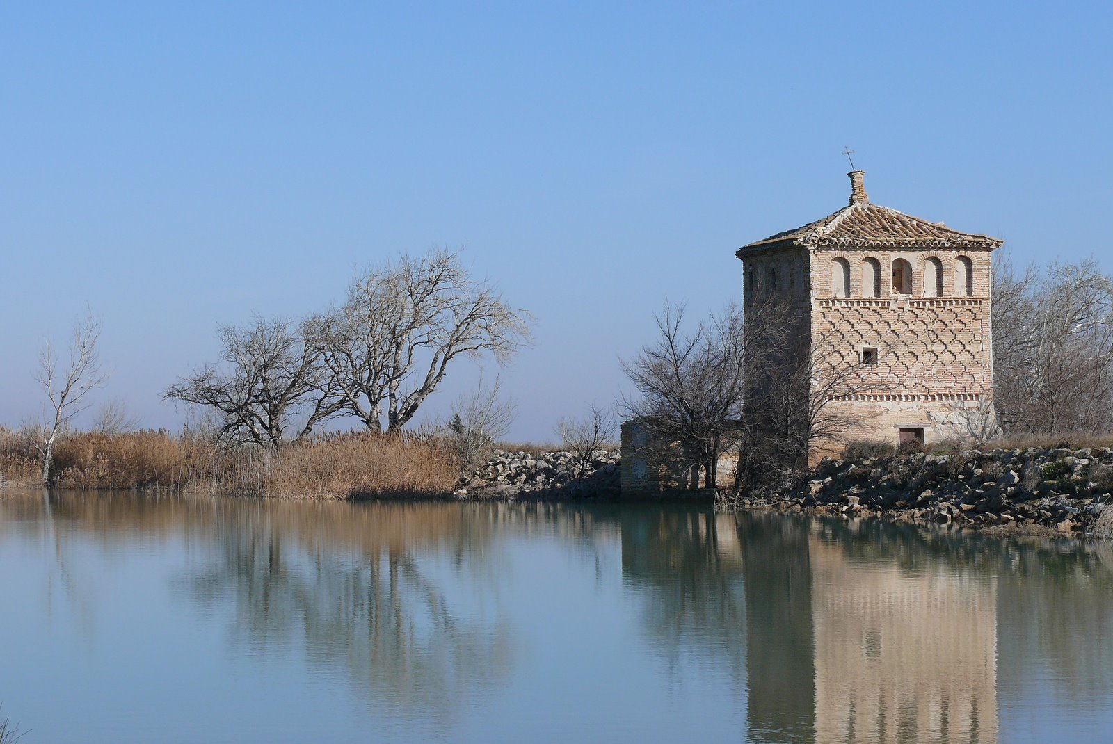 Casa de la Estanca, Borja, España